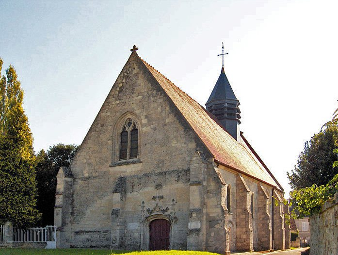 vue du nord-est.